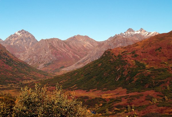 Summit Lake area, Talkeetna Mountains, Alaska